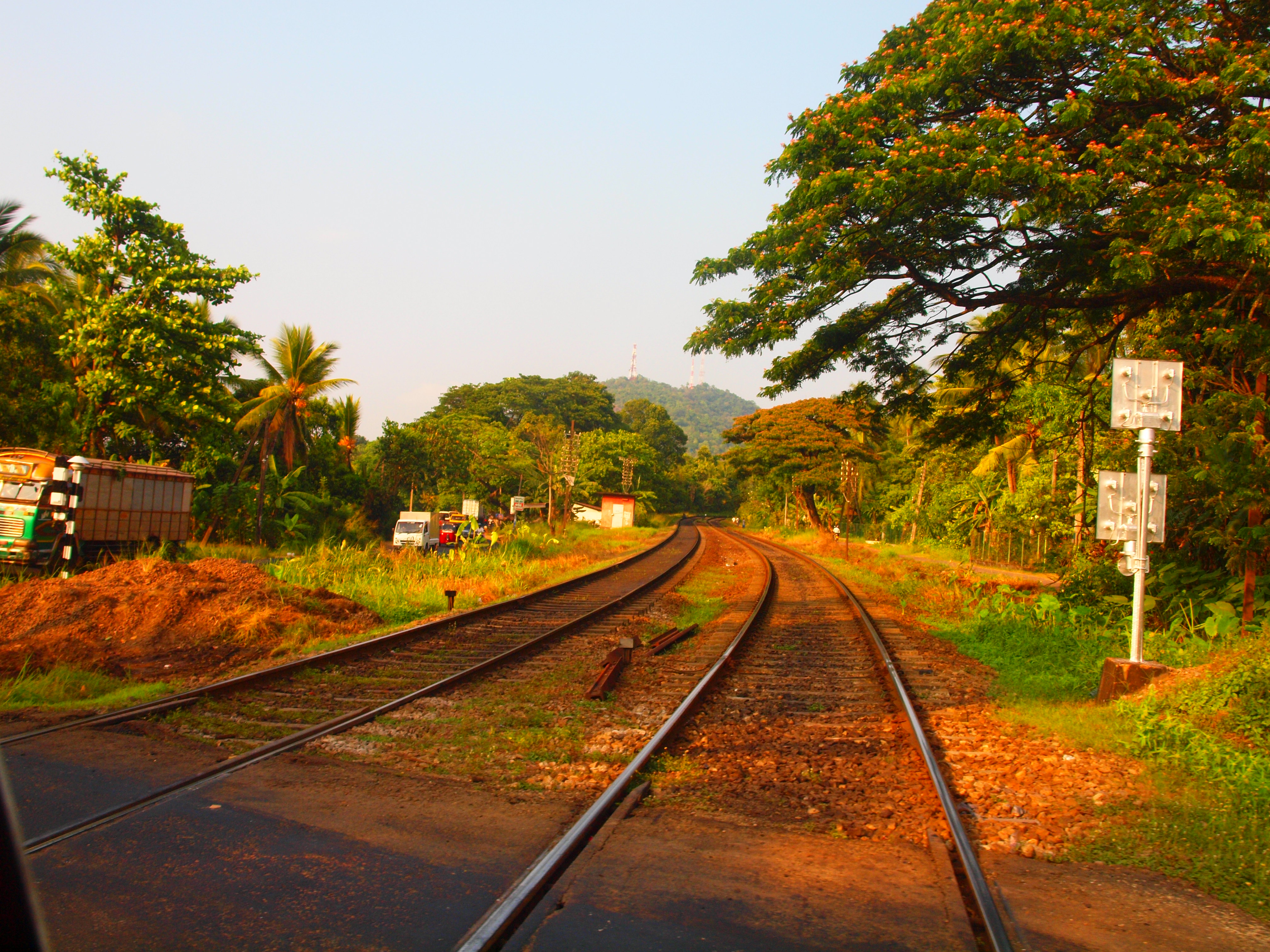 Railway in Sri Lanka